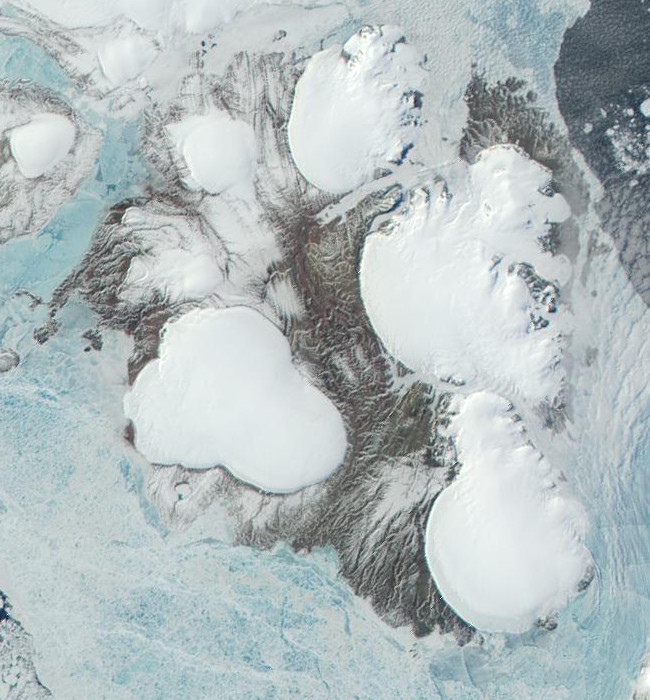 Wyspa Rewolucji Październikowej